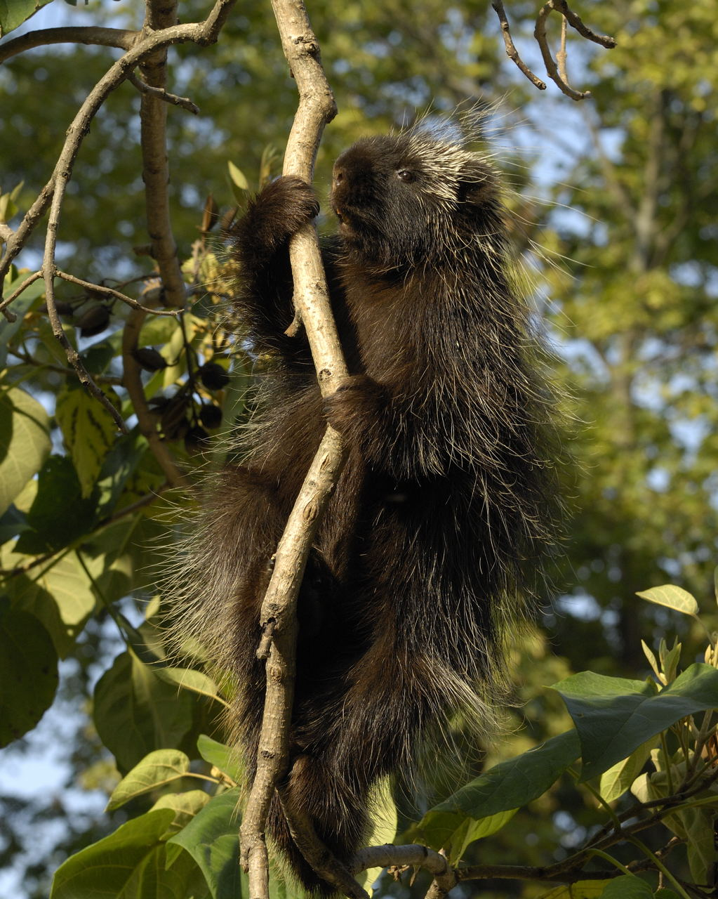 Urson Erethizon dorsatum im Tiergarten Schönbrunn, Wien, Österreich